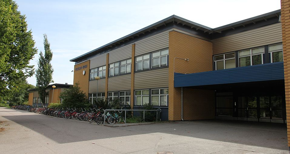 Peltolan koulu on Vantaan Tikkurilan urheilupuistossa sijaitseva, peruskoulun 7.-9. luokkien opetukseen keskittyvä koulu. Huom: Muista säilyttää viittaus kuvaajaan, mikäli käytät kuvaa.